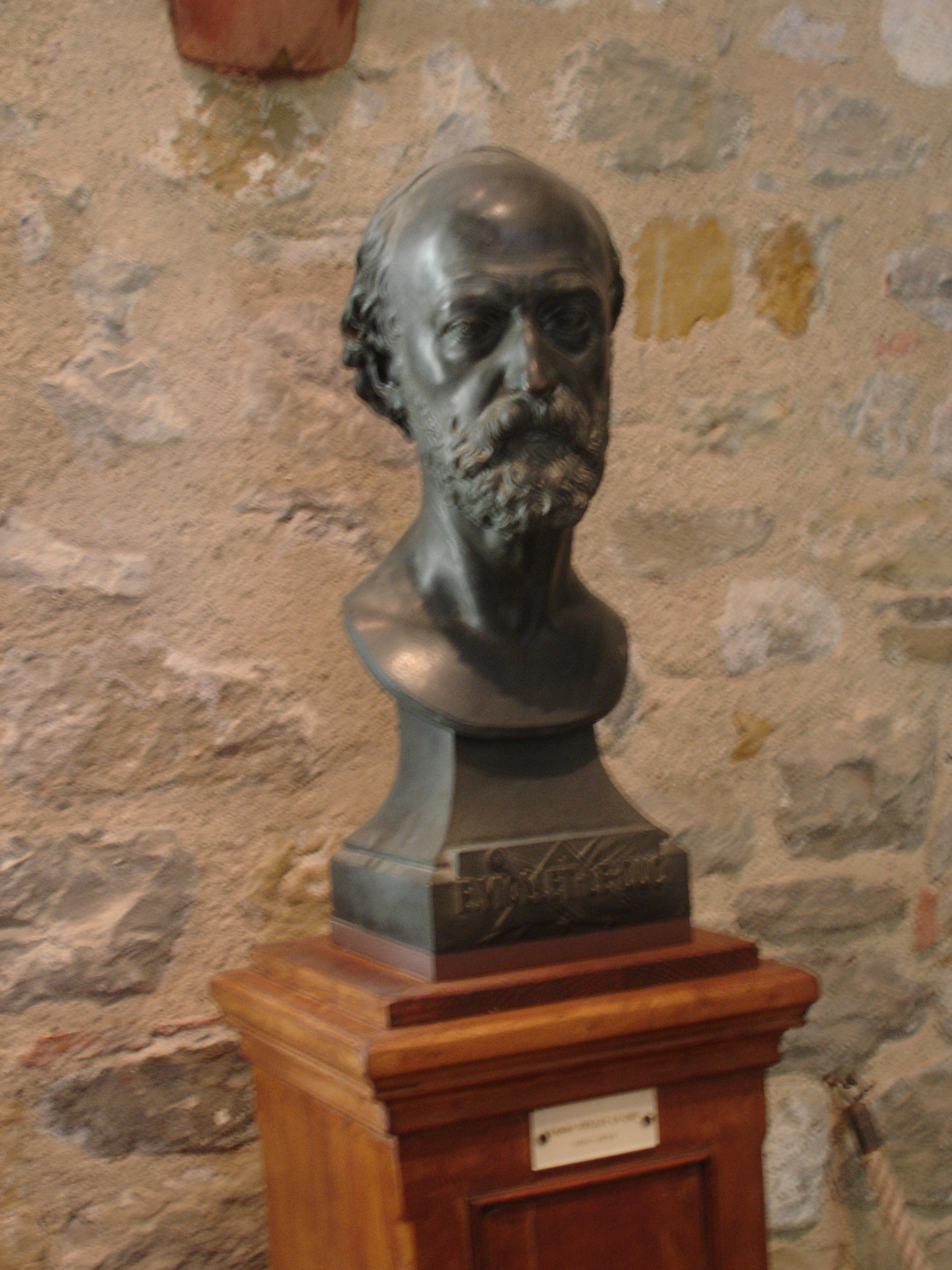 France, Aude (11), Buste de eugène Viollet-le-Duc